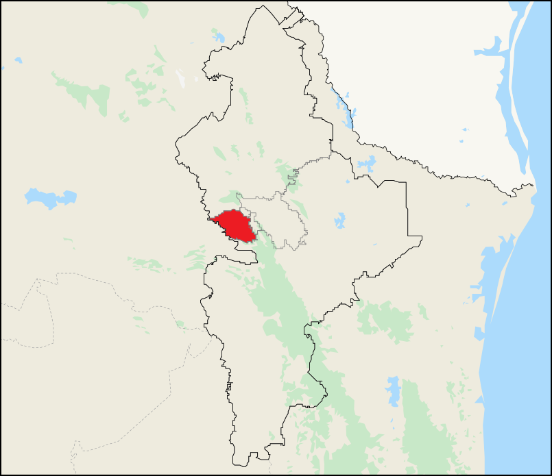 Mapa del distrito electoral federal 1 ubicado en Nuevo León